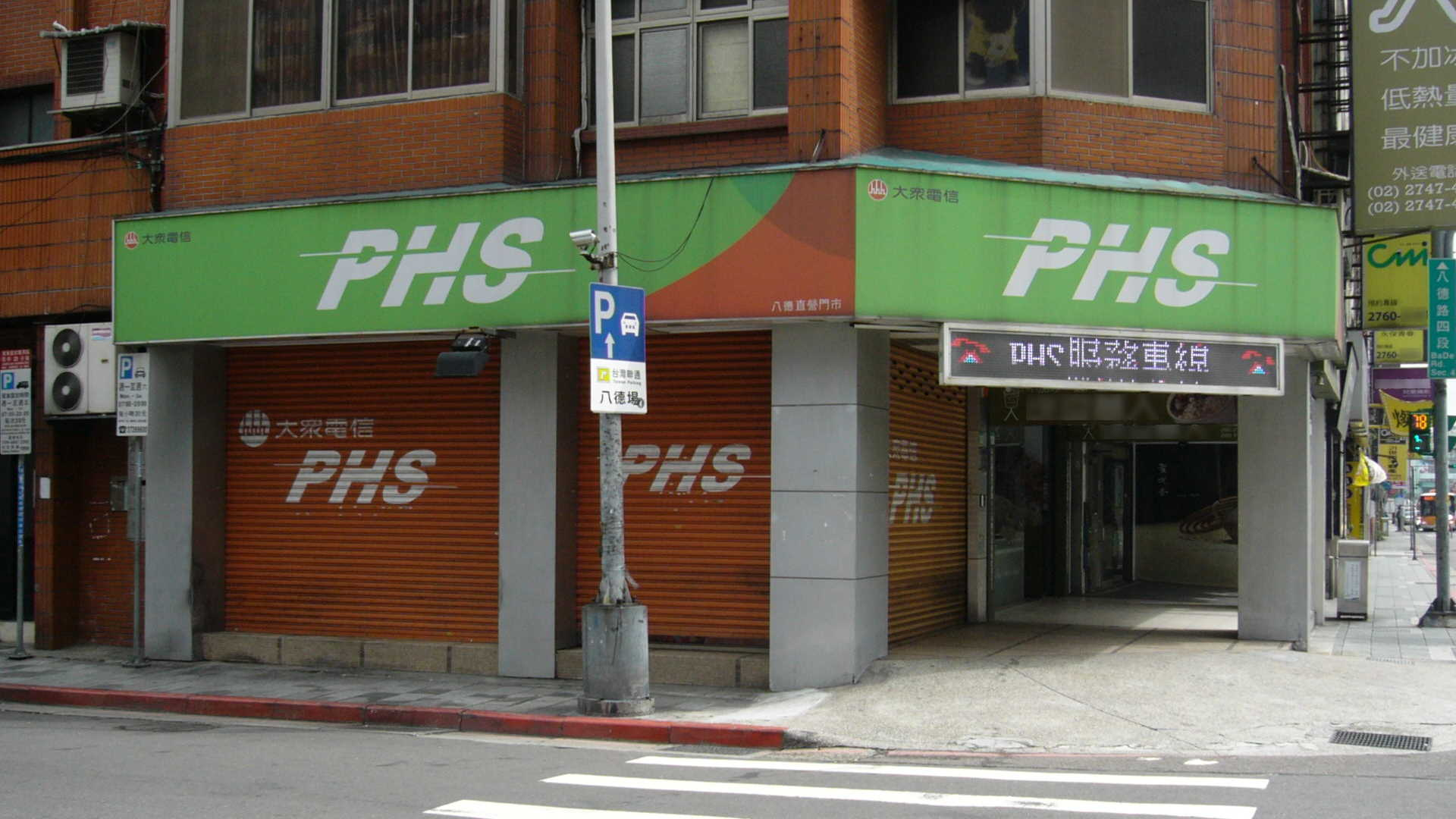 大眾電信八德直營門市，位於臺北市松山區八德路四段165號1樓，2013年1月重訪時已關閉。